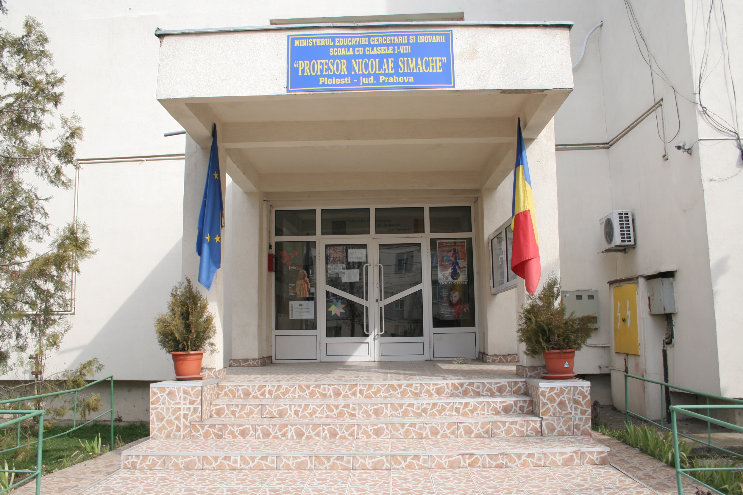 Şcoala Profesor Nicolae Simache Ploieşti